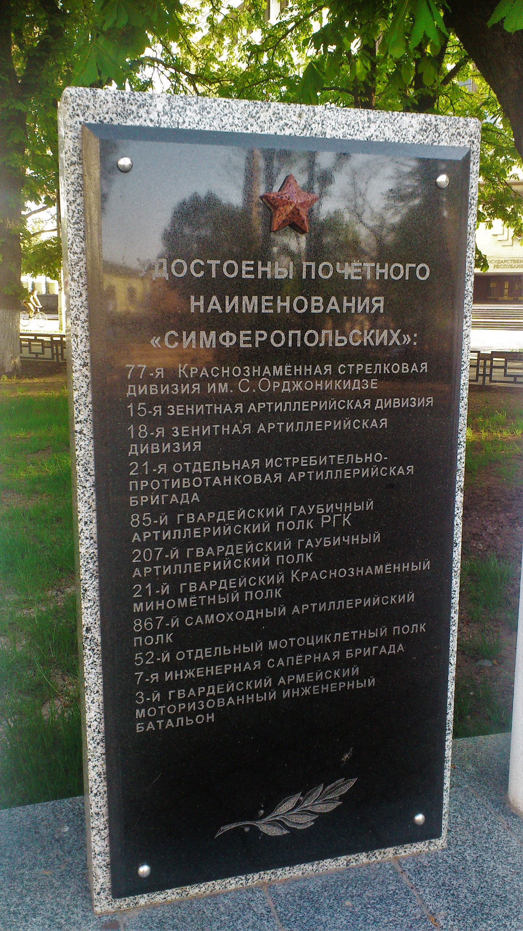 Надпись на плите: "Удостоены почётного наименования "Симферопольских": 77-я Краснознамённая стрелковая дивизия им. С. Орджоникидзе, 15-я зенитная артиллерийская дивизия, 18-я зенитная артиллерийская дивизия, 21-я отдельная истребительно-противотанковая артиллерийская бригада, 85-й гвардейский гаубичный артиллерийский полк РГК, 207-й гвардейский гаубичный артиллерийский полк, 21-й гвардейский Краснознамённый миномётный полк, 867-й самоходный артиллерийский полк, 52-й отдельный мотоциклетный полк, 7-я инженерная сапёрная бригада, 3-й гвардейский армейский моторизованный инженерный батальон"